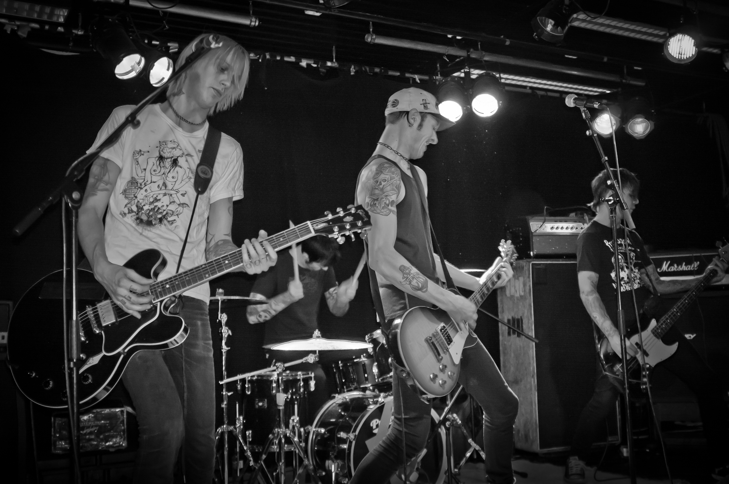 Oslo Ess på Scene 37 2012